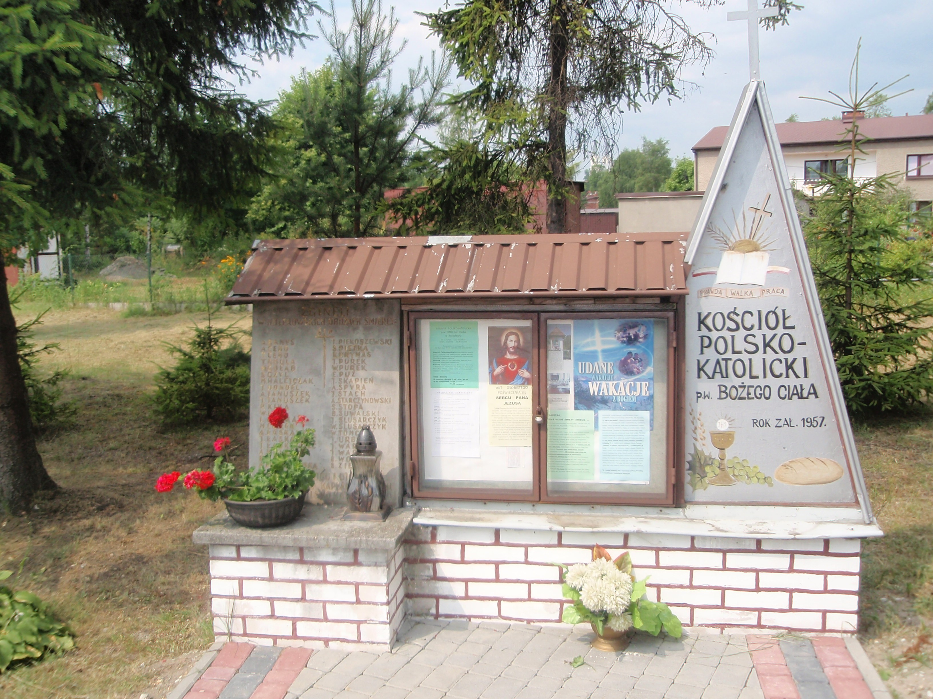 Parafia polskokatolicka w Bolesławiu (powiat olkuski)